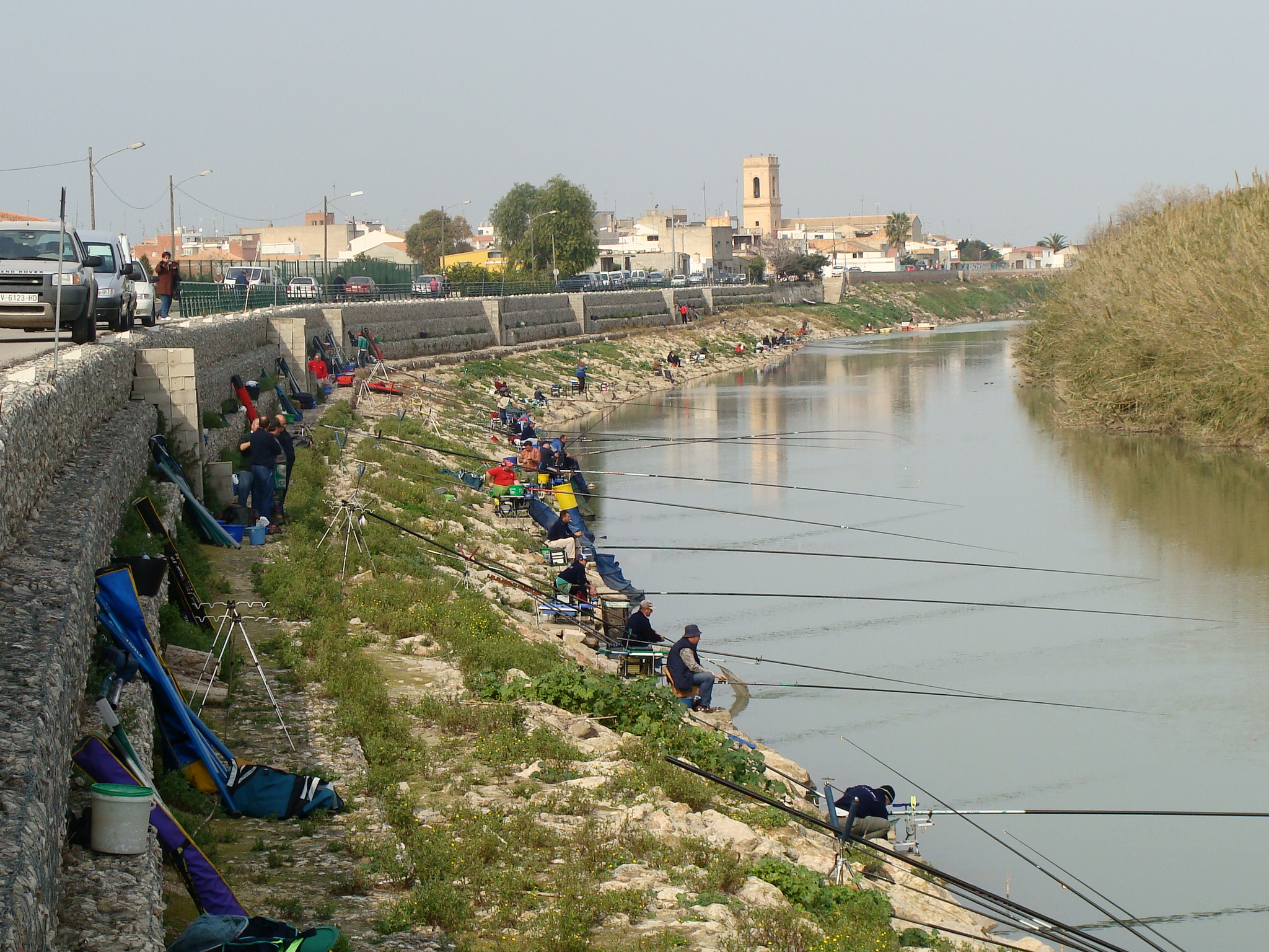 Los campeonatos provinciales y regionales de pesca sin muerte se realizan, en Valencia, en el río Júcar, junto a la población de Fortaleny